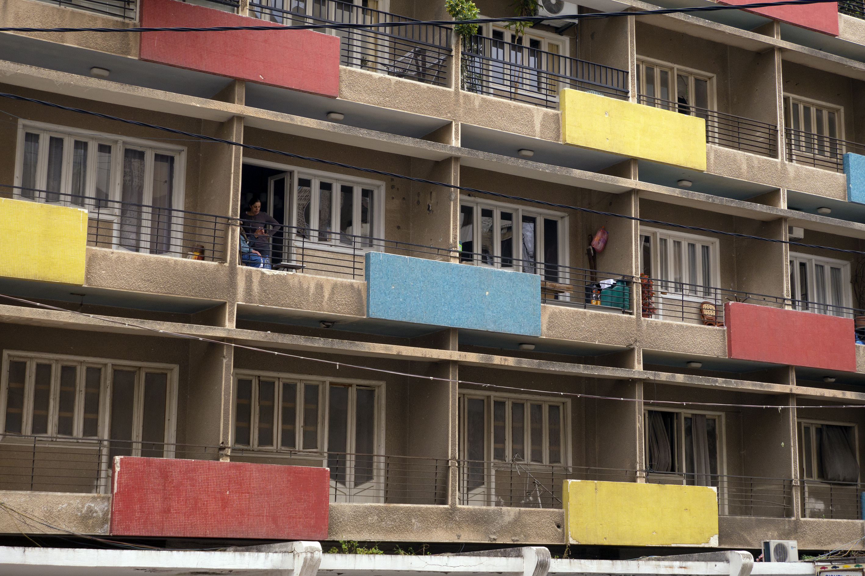 aus der Serie und das Buch "Confined Space"